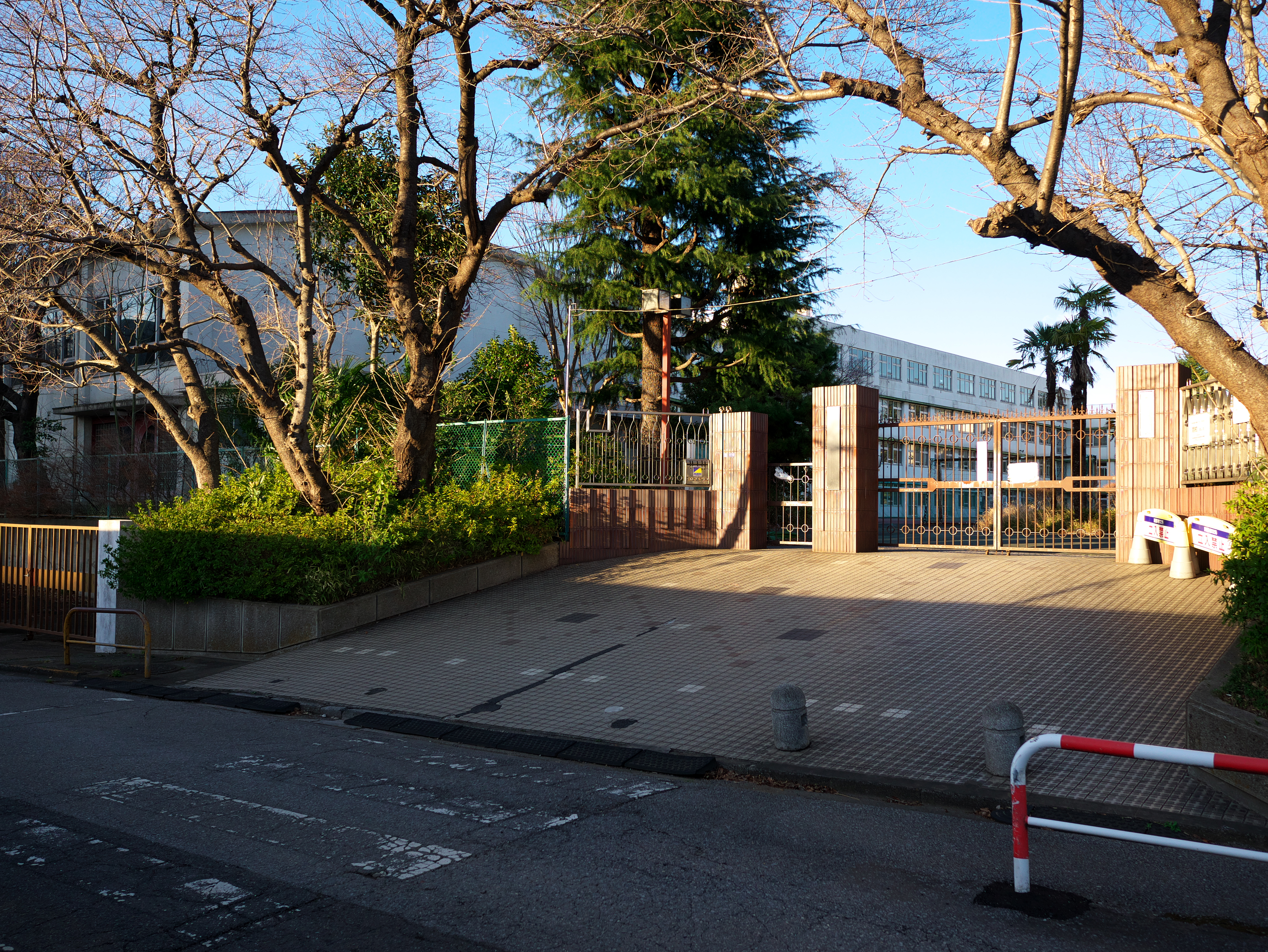 赤羽台東小学校の正門の様子です。